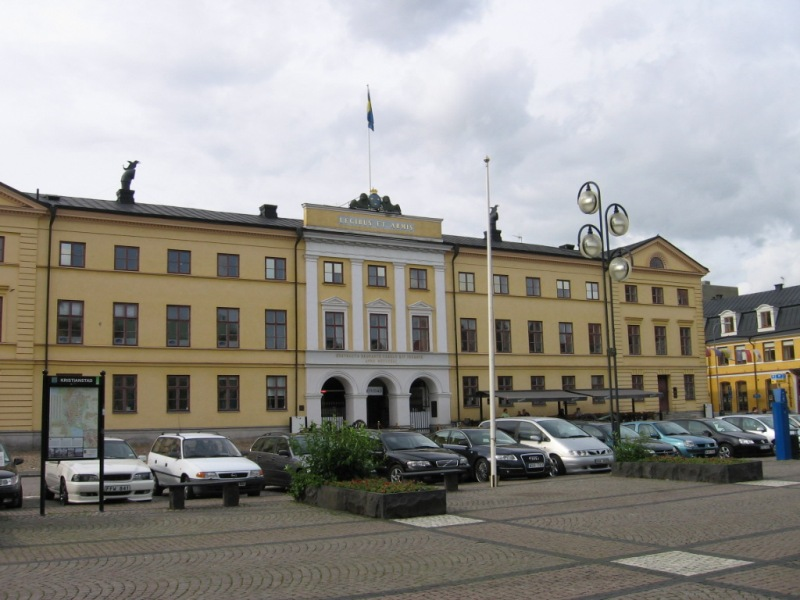 Kristianstad, Stora torget, Stora kronohuset